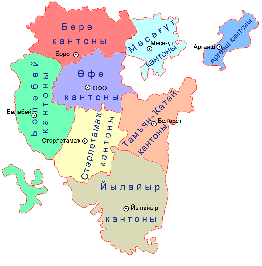 Башҡортса: Başqortostan ASSR-ь 1927